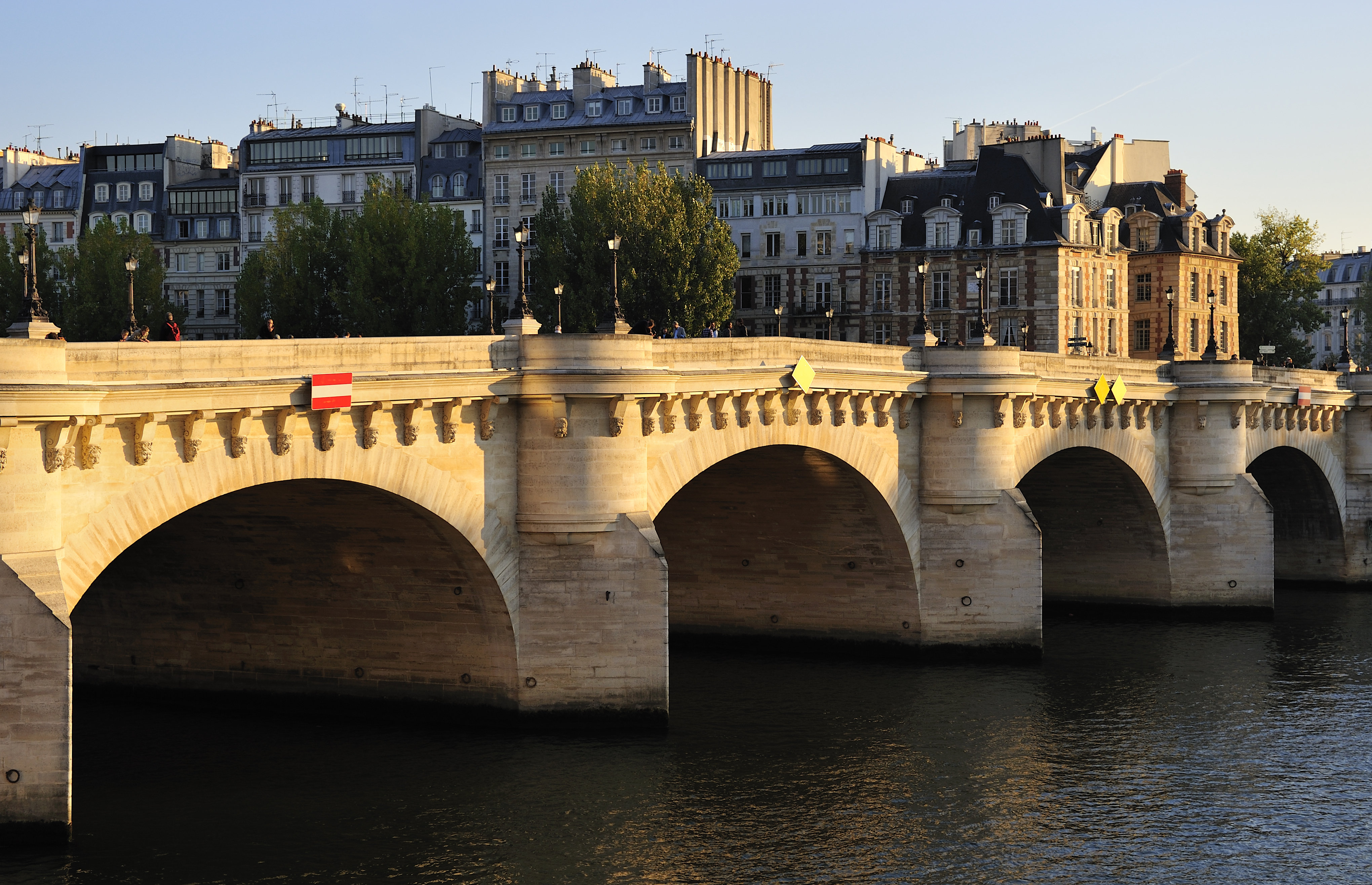 Pont Neuf, Paris.